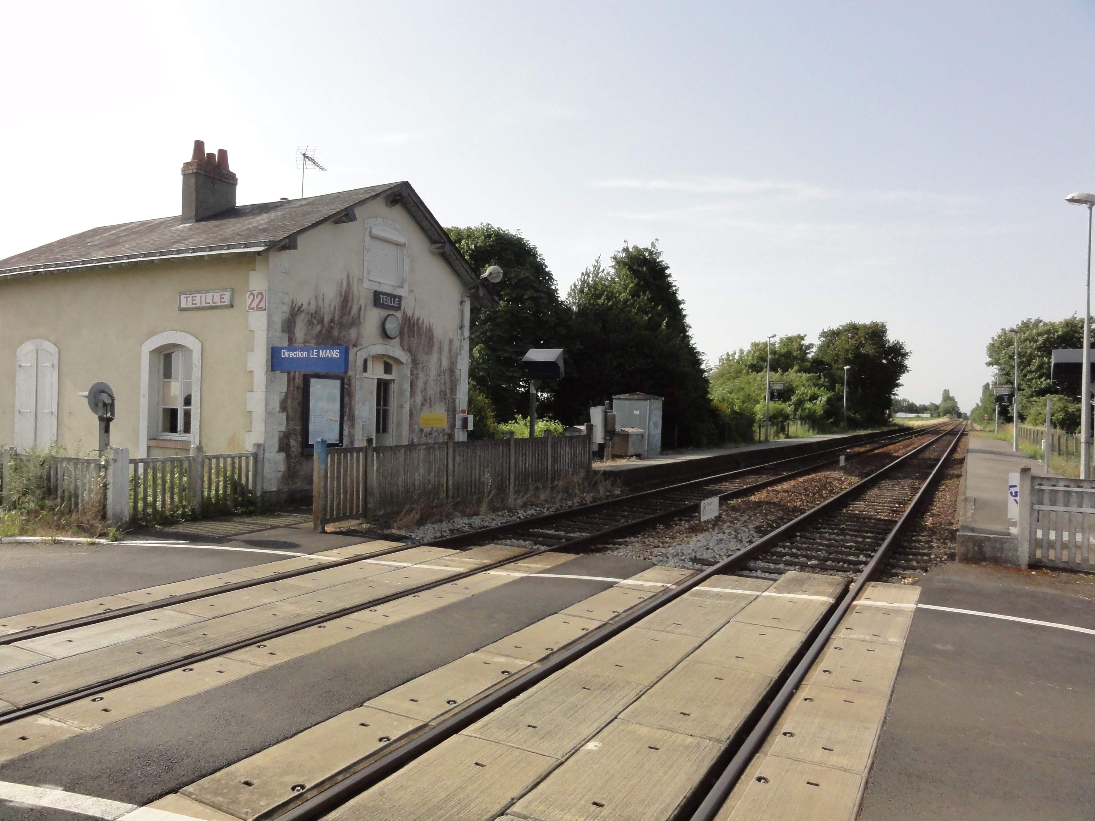 Teillé (Sarthe) gare avec quais